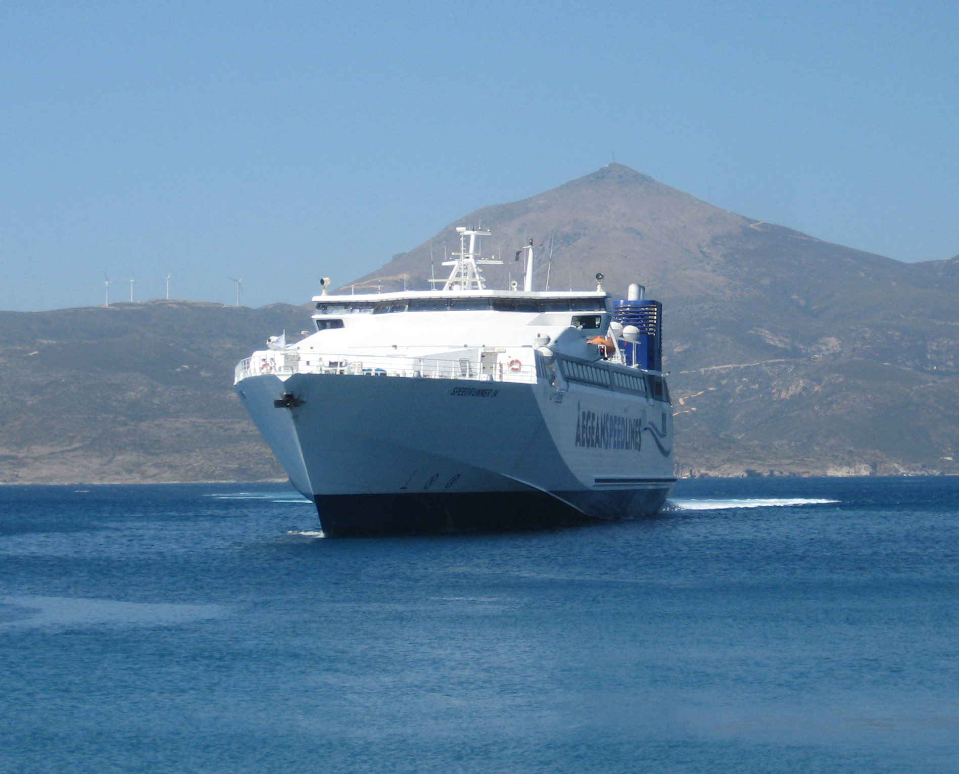 Speedrunner IV arriving at Milos